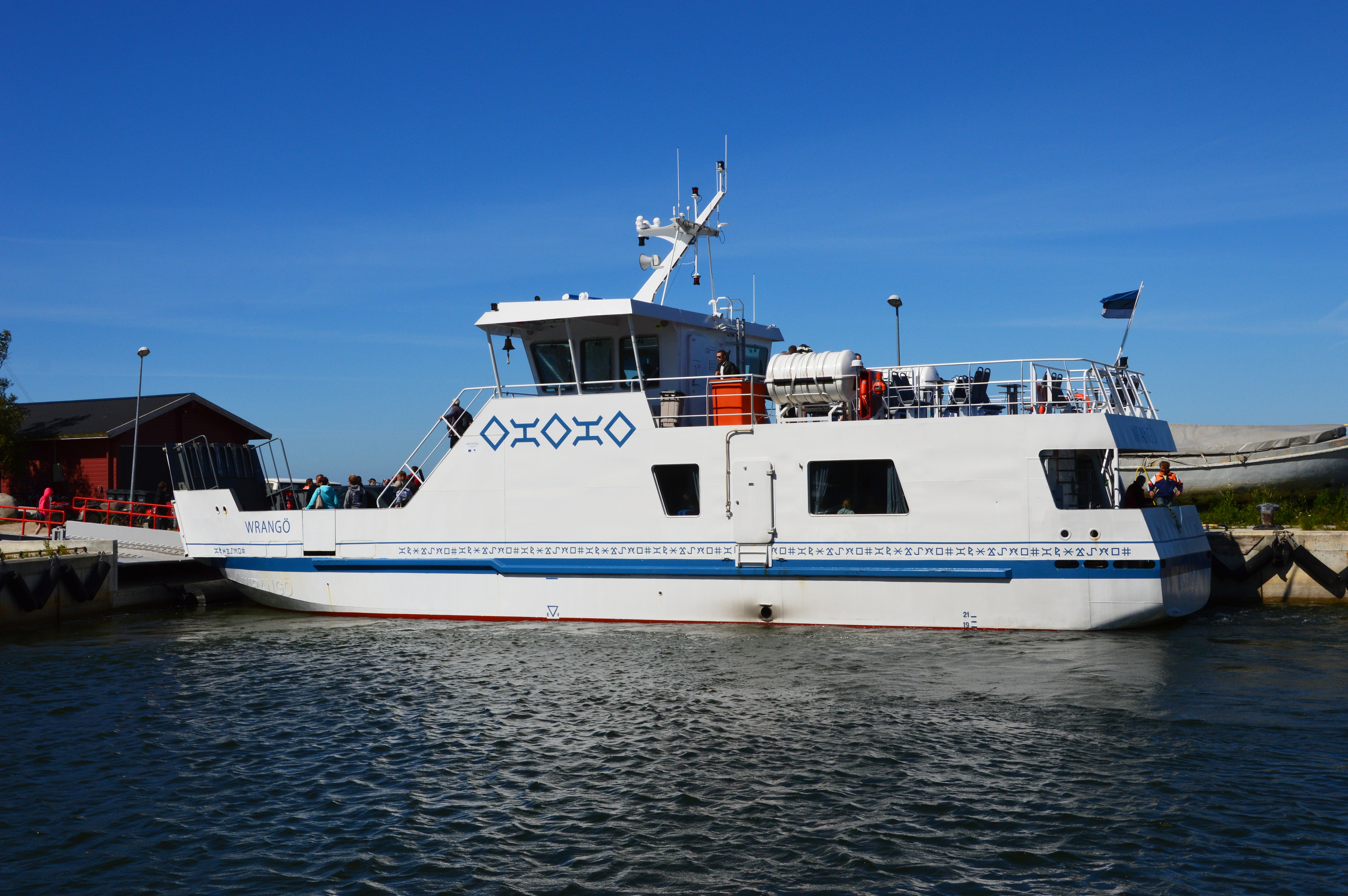 Wrangö Kelnase sadamas